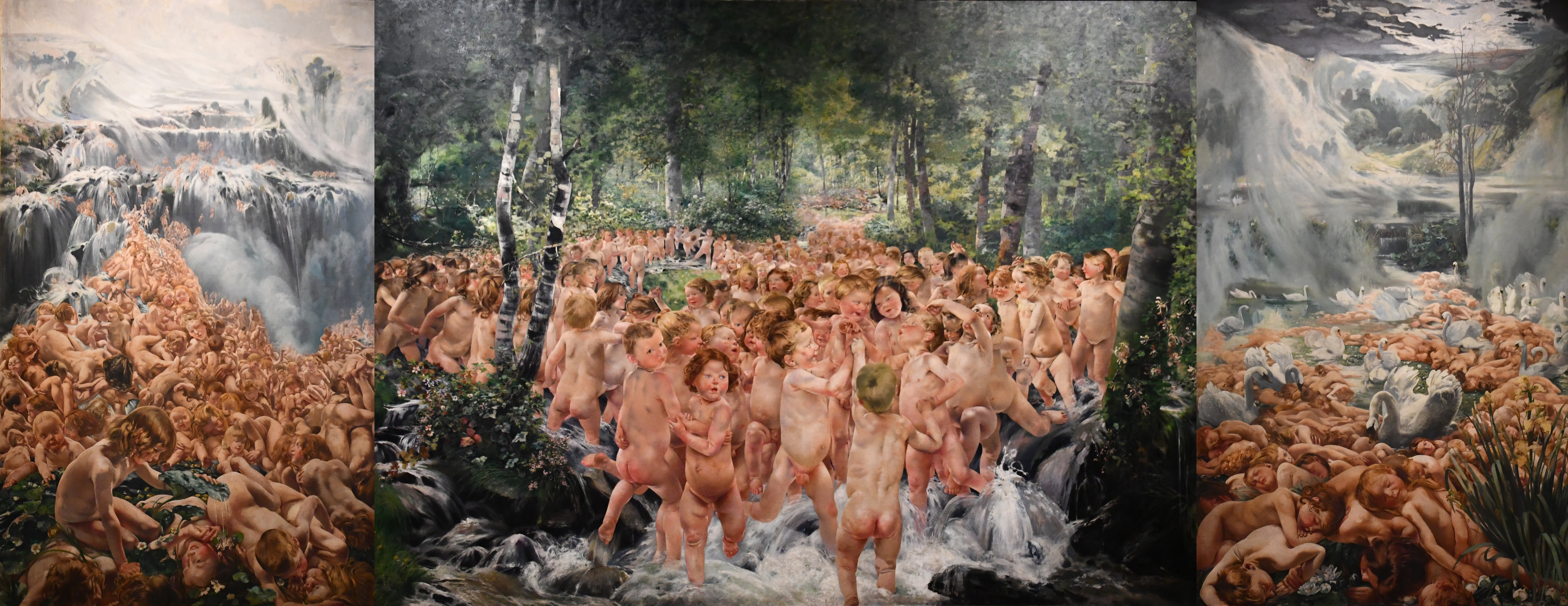 Le ruisseau - Léon Frédéric - 1890-1899 Musées royaux des beaux-arts - Bruxelles. La finesse de la peinture ne peut être rendue en photo de par l'éclairage du musée.